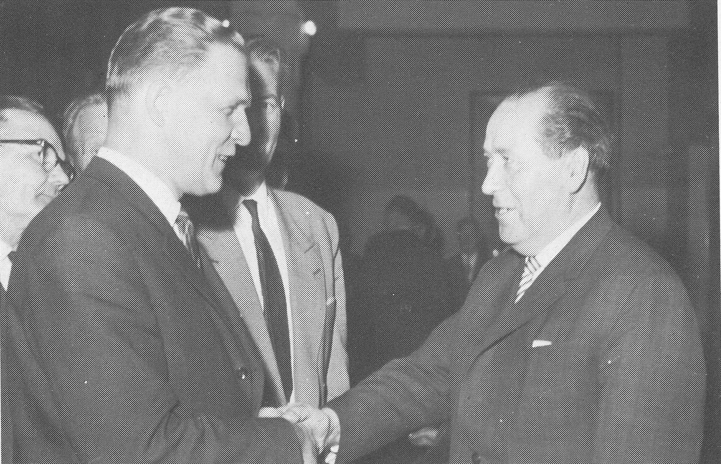 Veikko Helle onnittelee Rafael Paasiota